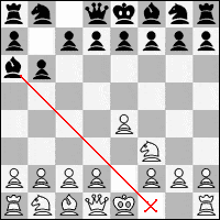 Exemple numero 3 pour l'article roque.